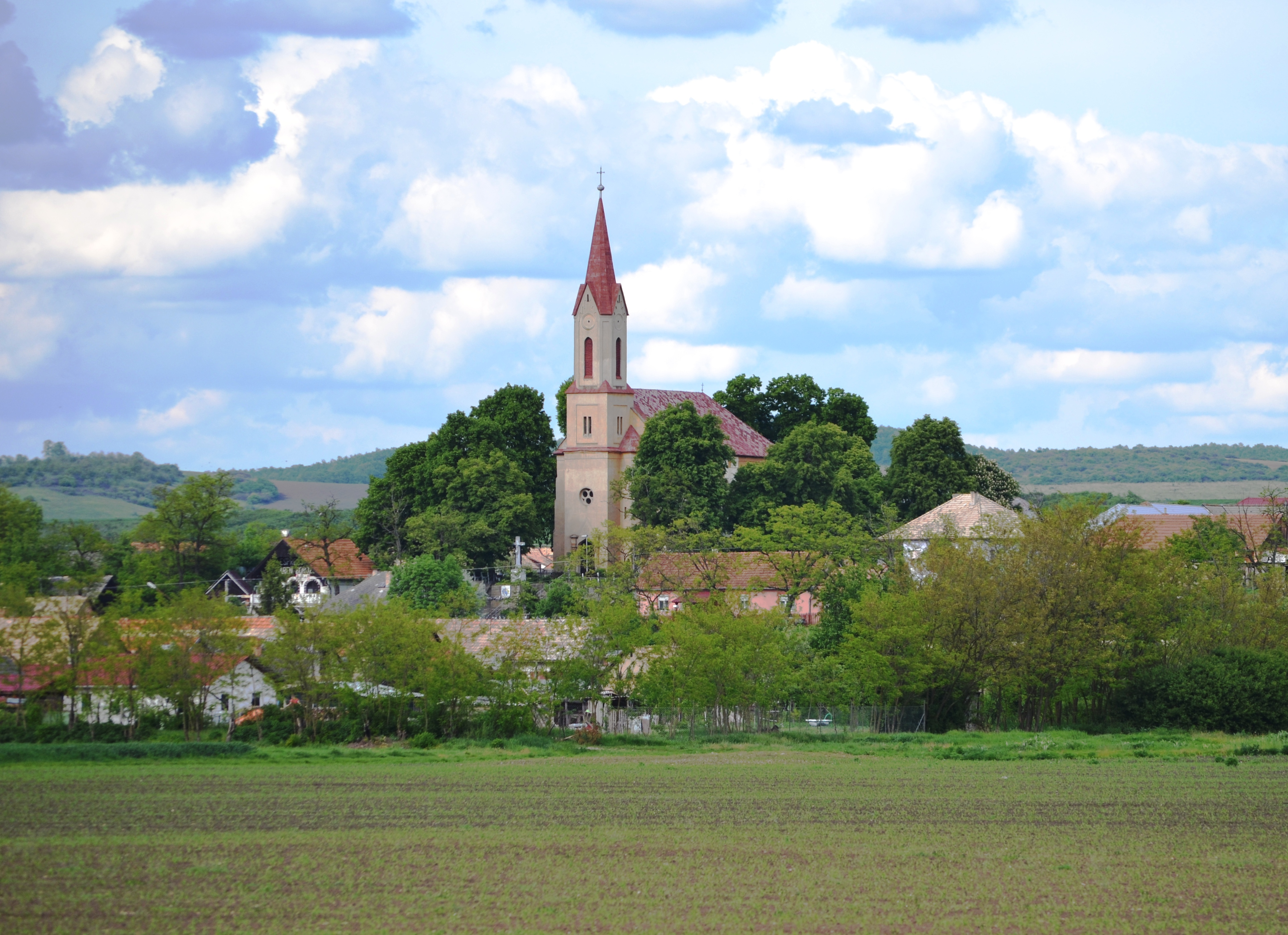 Rímskokatolícky Kostol Nanebovzatia Panny Márie v Abovciach